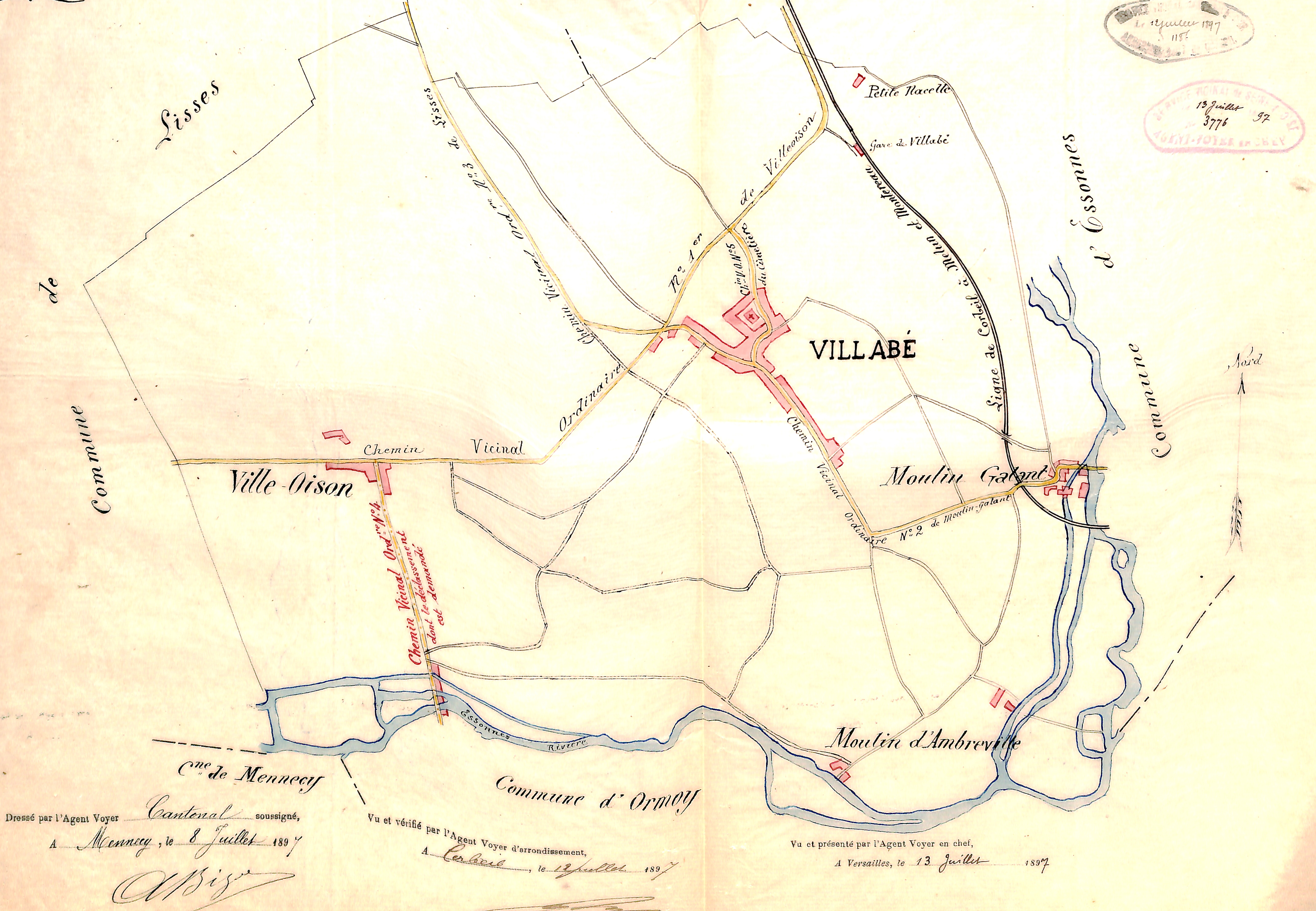 Plan de Villabé en 1897 lors du déclassement du chemin vicinal n°4